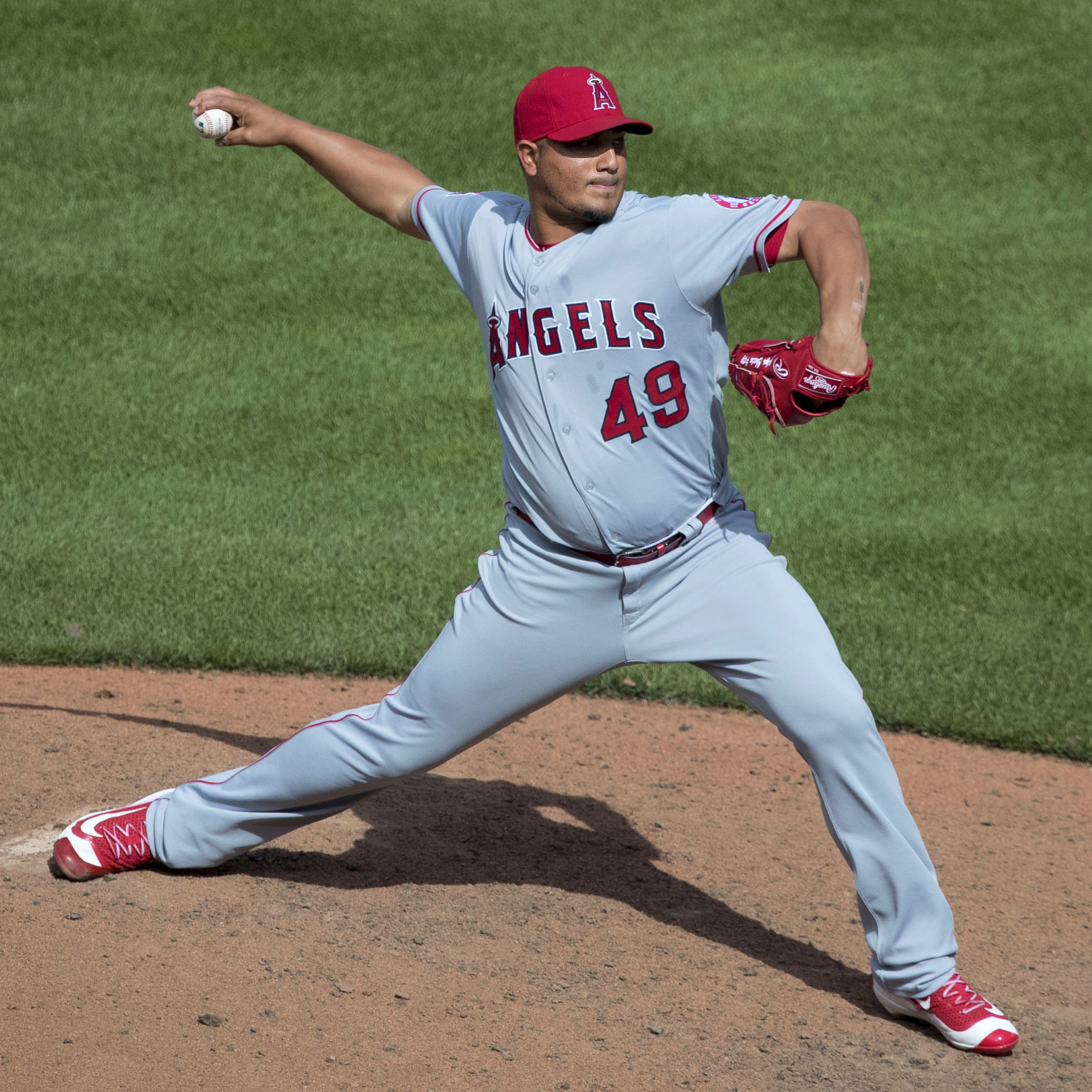 Jhoulys Chacín